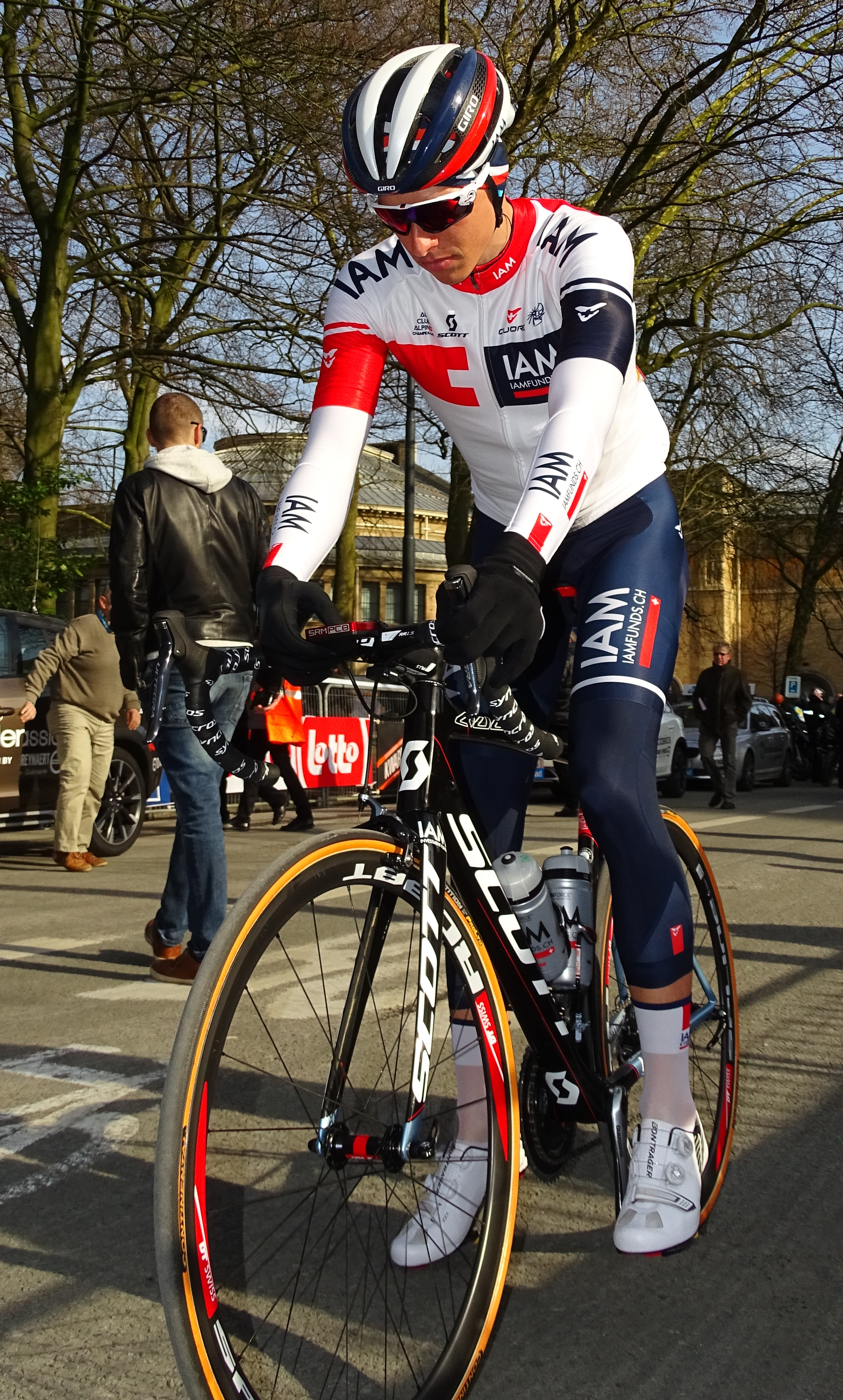 Reportage réalisé le samedi 27 février à l'occasion du départ et de l'arrivée du Circuit Het Nieuwsblad 2016 et de l'arrivée du Circuit Het Nieuwsblad féminin 2016 à Gand, Belgique.